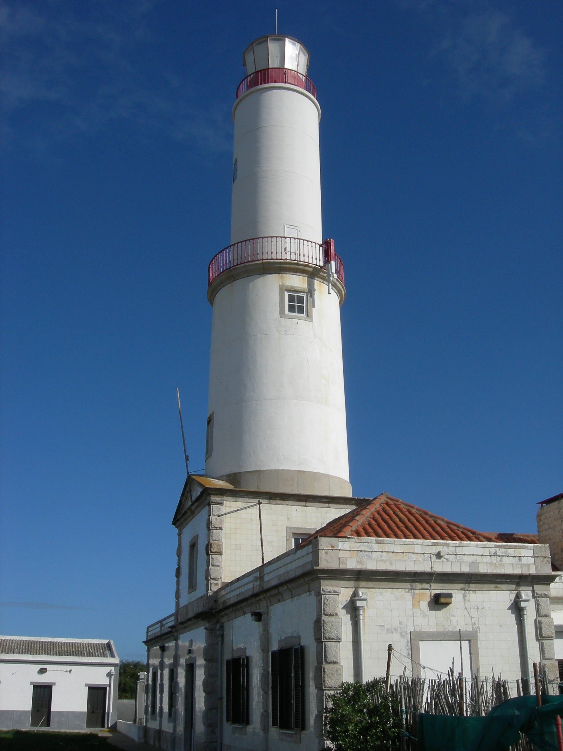 Sines. Faro.